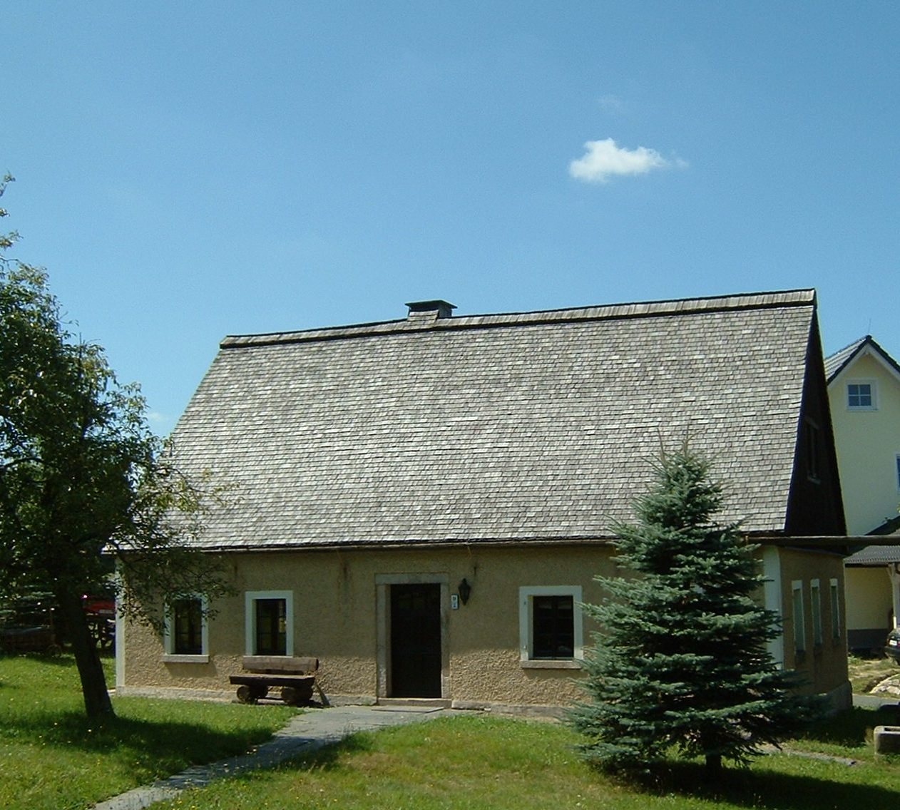 Hundshübel, Ortsteil von Stützengrün im Erzgebirge, Nadlerhaus (ehem. Tagelöhnerhaus